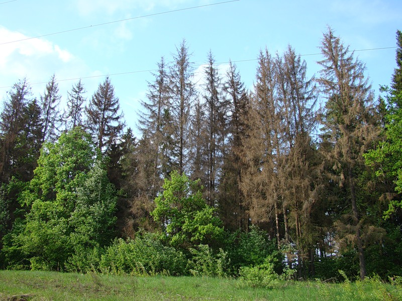 Повреждённый короедом-типографом участок в Подмосковье